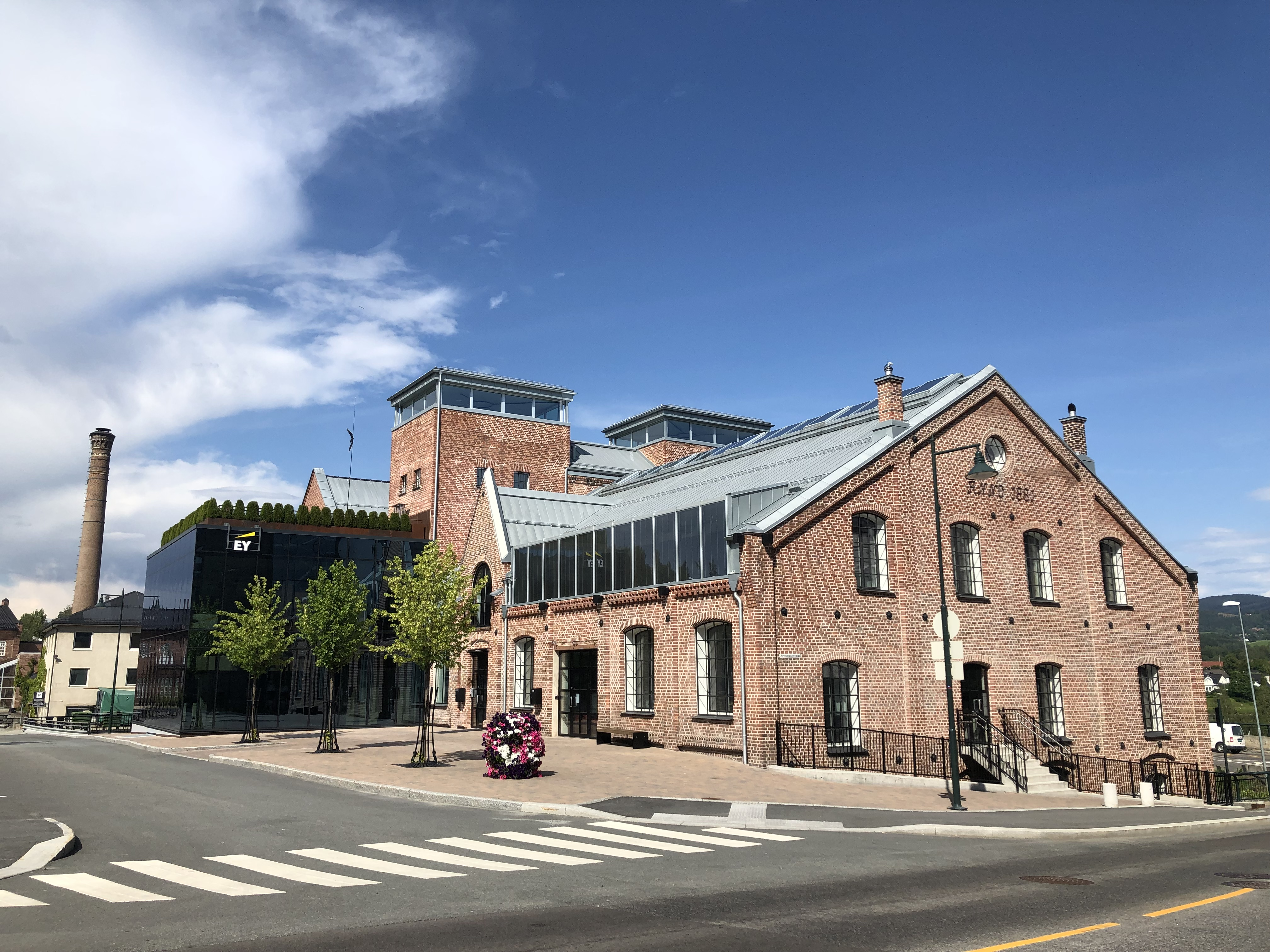 Arnemannsveien 3, Hønefoss.